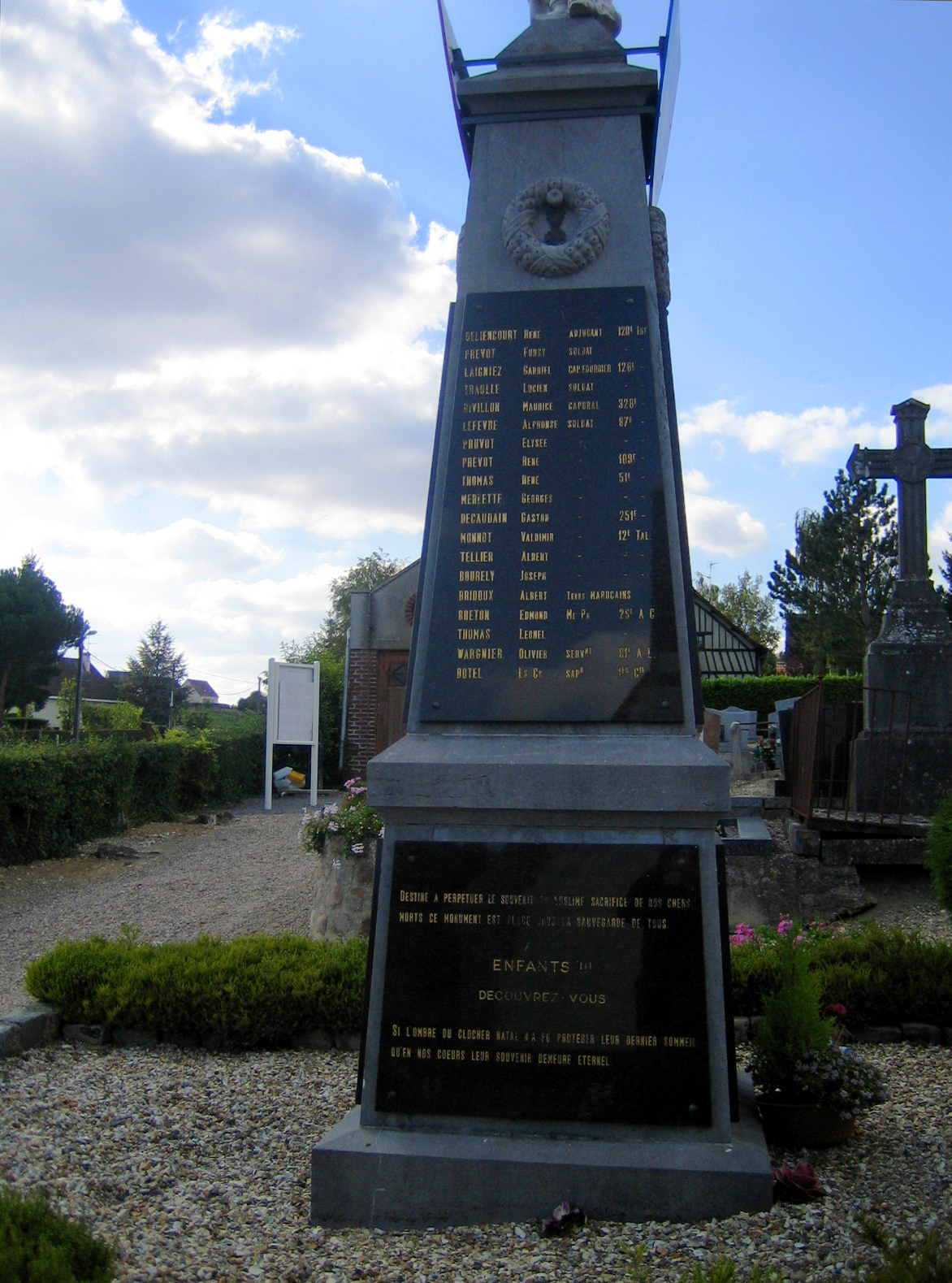 Pont-de-Metz (Somme, France) - Le monument-aux-morts (face Est, regardant le portail de l'église). . .